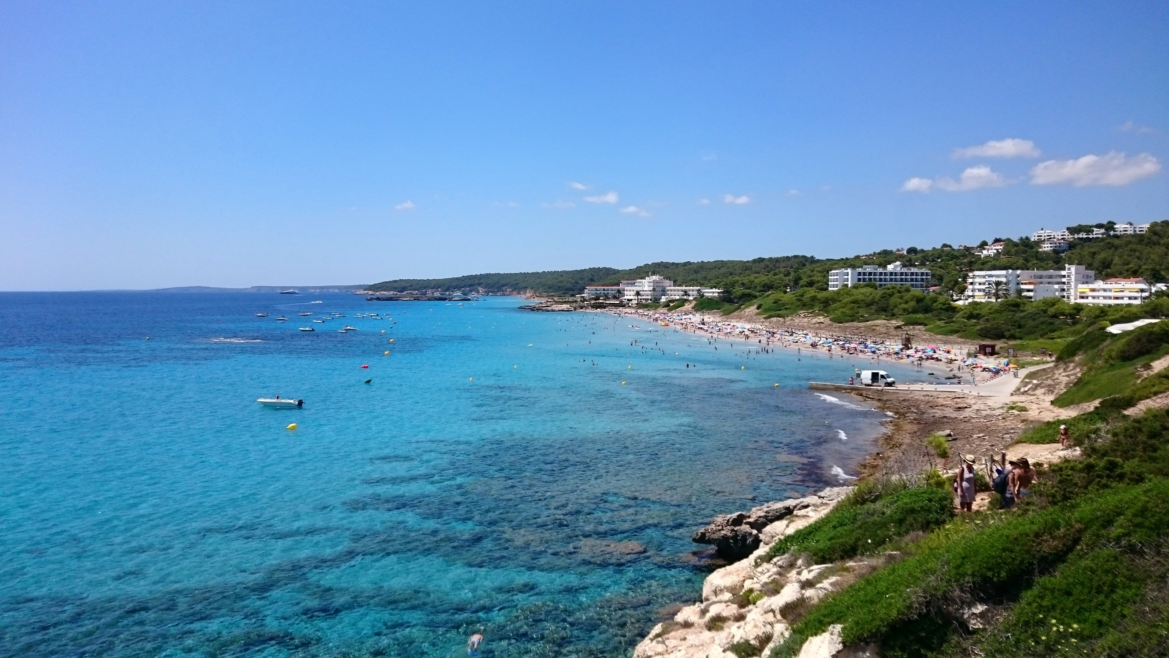 Vista de Sant Tomàs desde la punta de Talis. Los esculls de Binicodrells al fondo This is a photography of a Site of Community Importance in Spain with the ID: ES0000239. Natura2000 entry, EEA entry